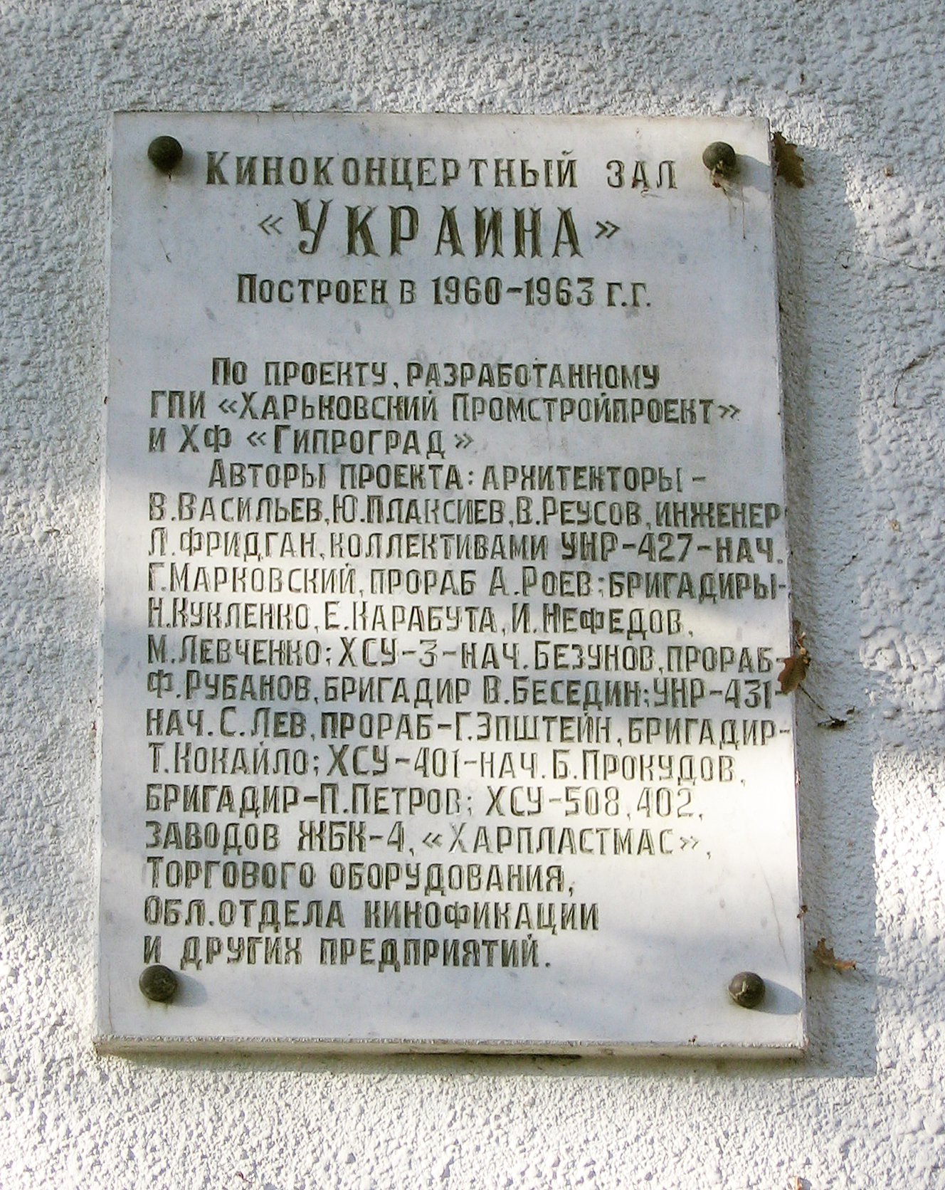 Анотаційна дошка кіноконцертної зали "Україна" (Харків, вул. Сумська, 35)